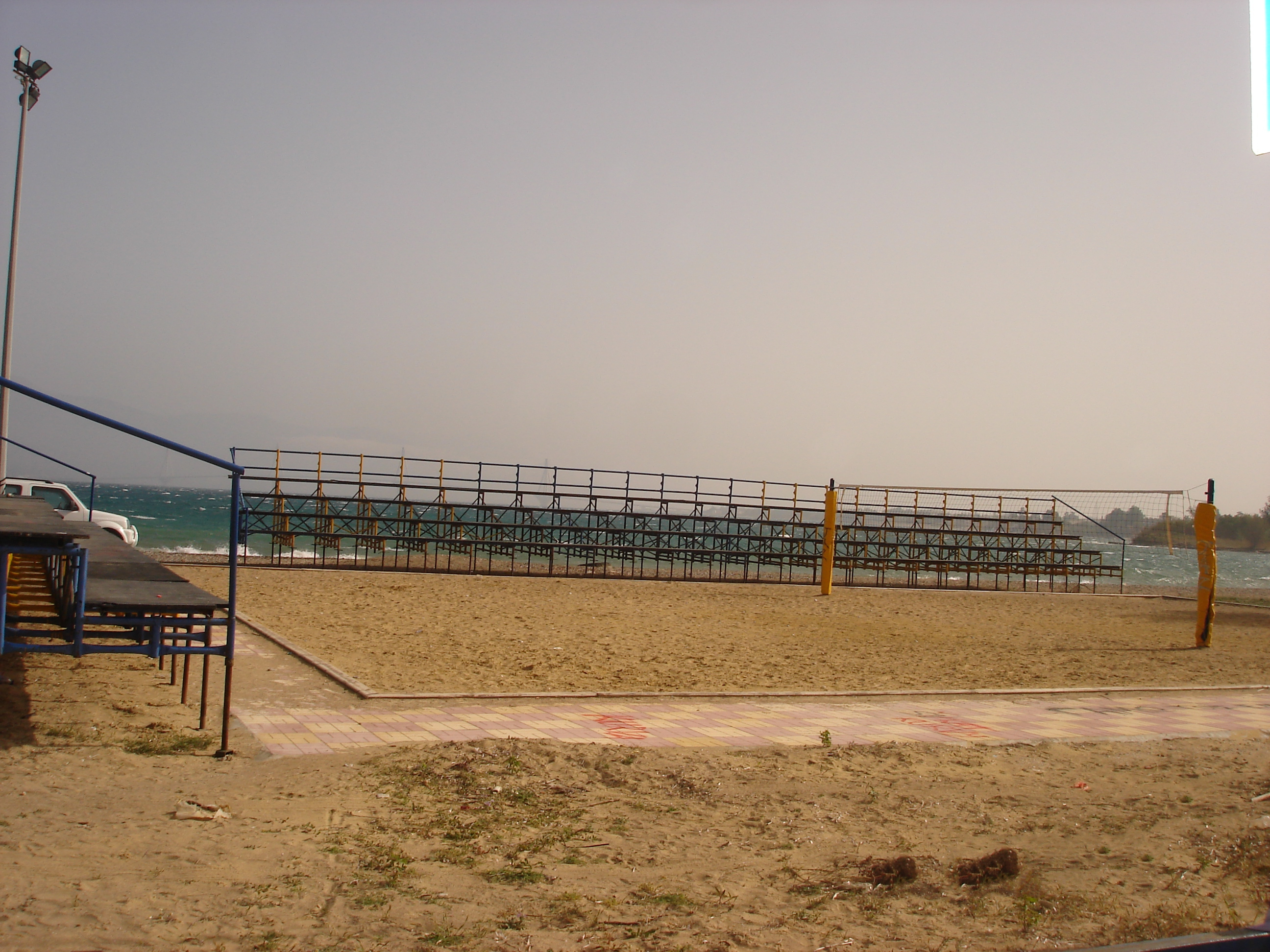 Agyia cape in patras Greecce, the foto the beach volley Αγυιά , ακρωτήριο, έλος και συνοικία της Πάτρας, Στην φωτογραφία το γήπεδο beach volley